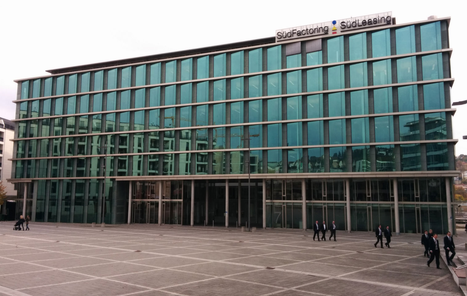 Zentrale von SüdFactoring und SüdLeasing am Pariser Platz in Stuttgart